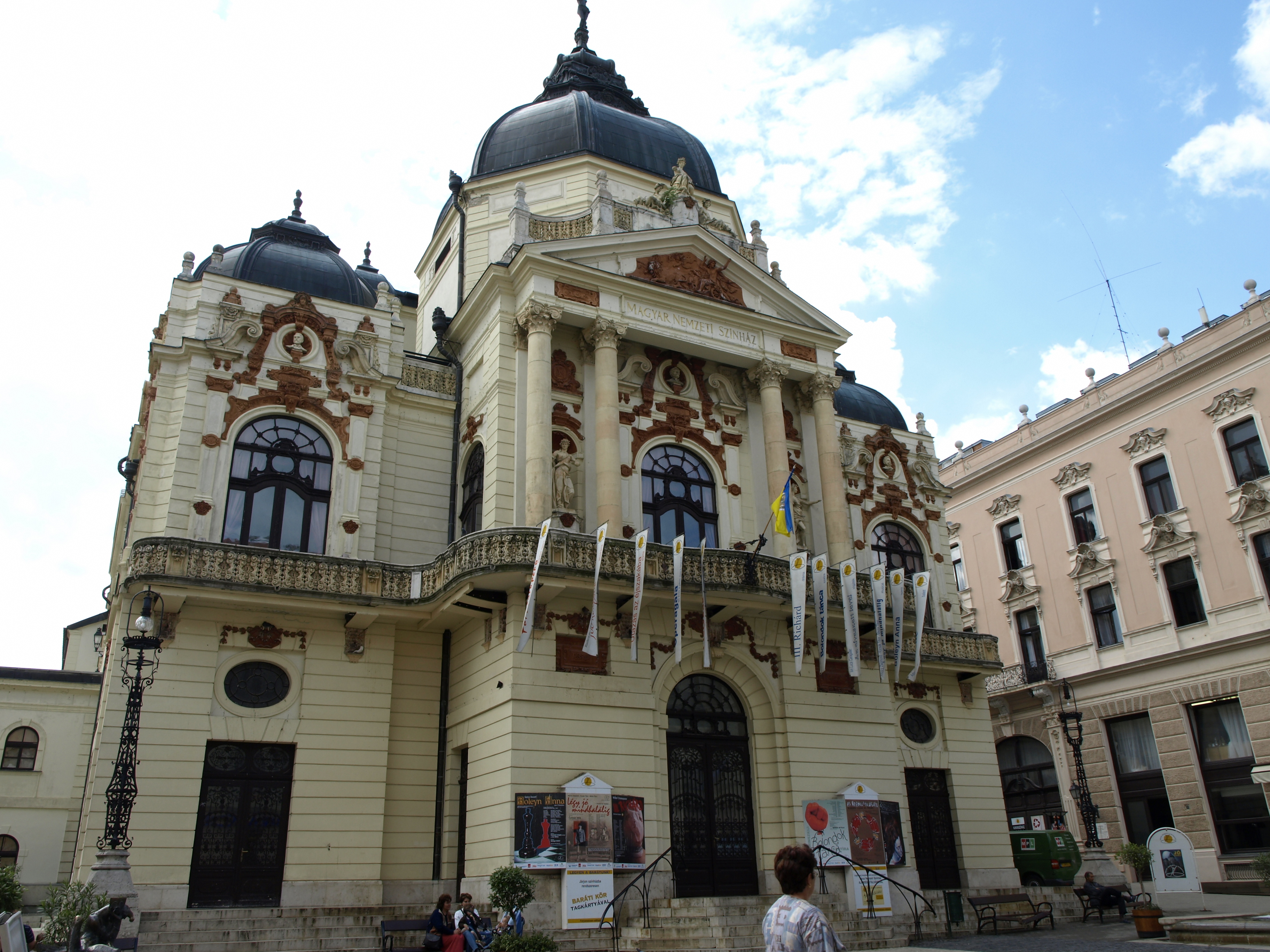 il teatro nazionale